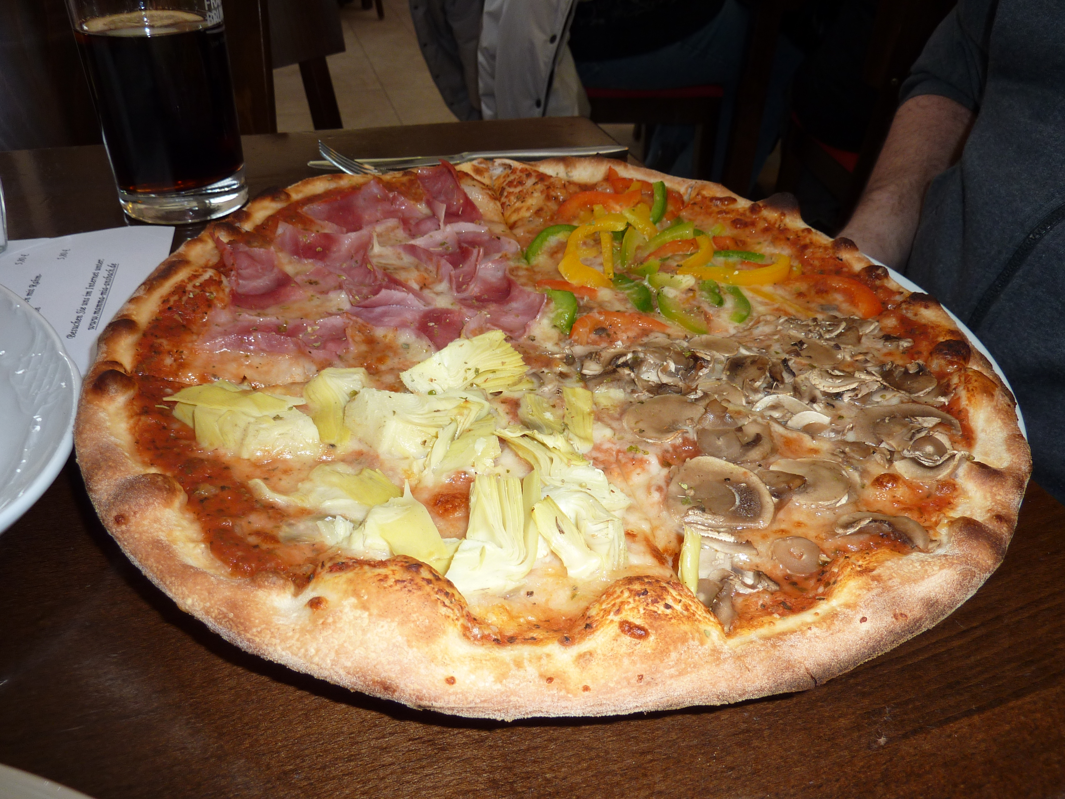 Pizza Quattro Stagioni